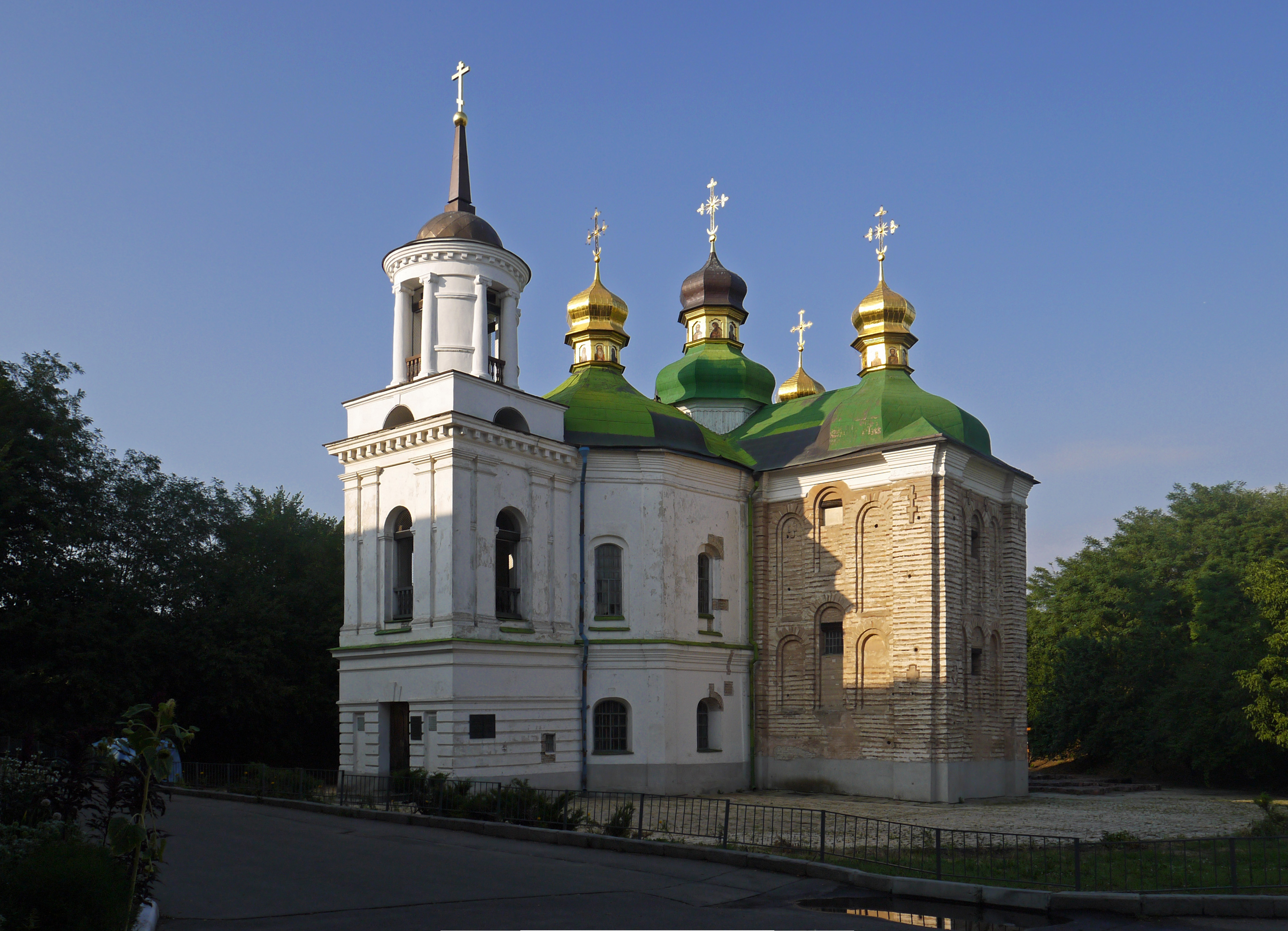 Церква Спаса на Берестові, Київ, Лаврська вул., 5